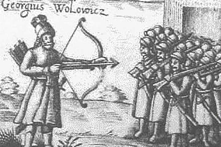 Беларуская (тарашкевіца): Продак Валовічаў (Vałovič)